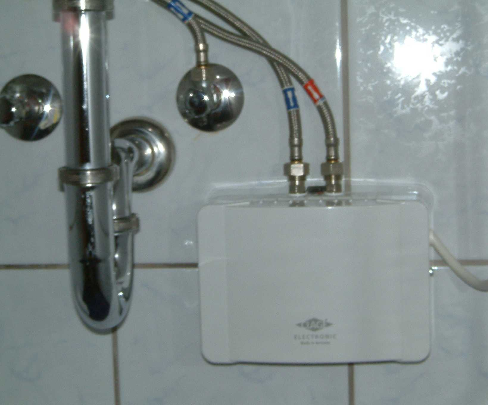 Hydraulisch gesteuerter Durchlauferhitzer, 2 kW Maximalleistung, Einphasenwechselstrom, 230 Volt Phasenspannung